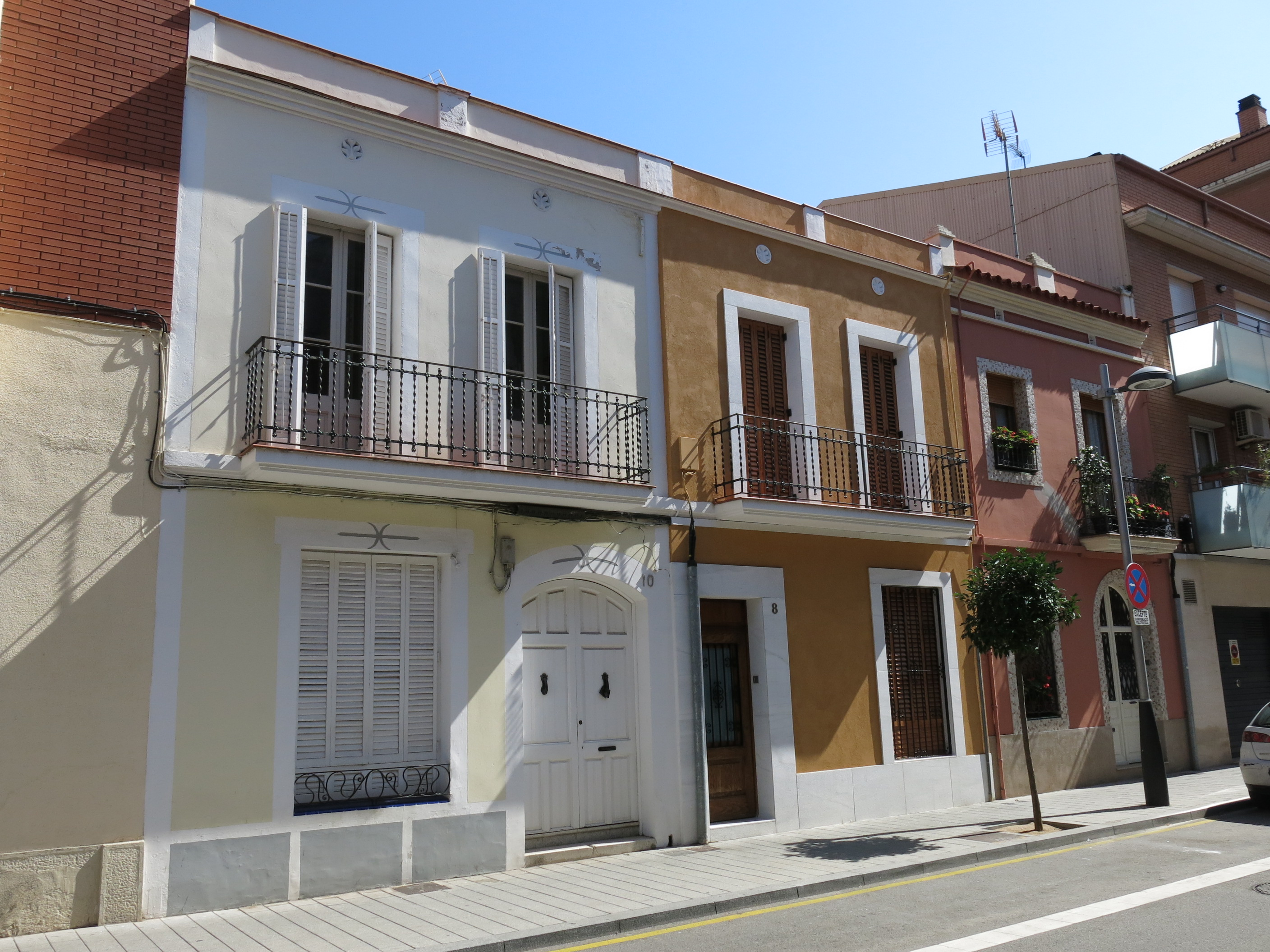 Habitatges al carrer Frederic Casas (Sant Joan Despí)